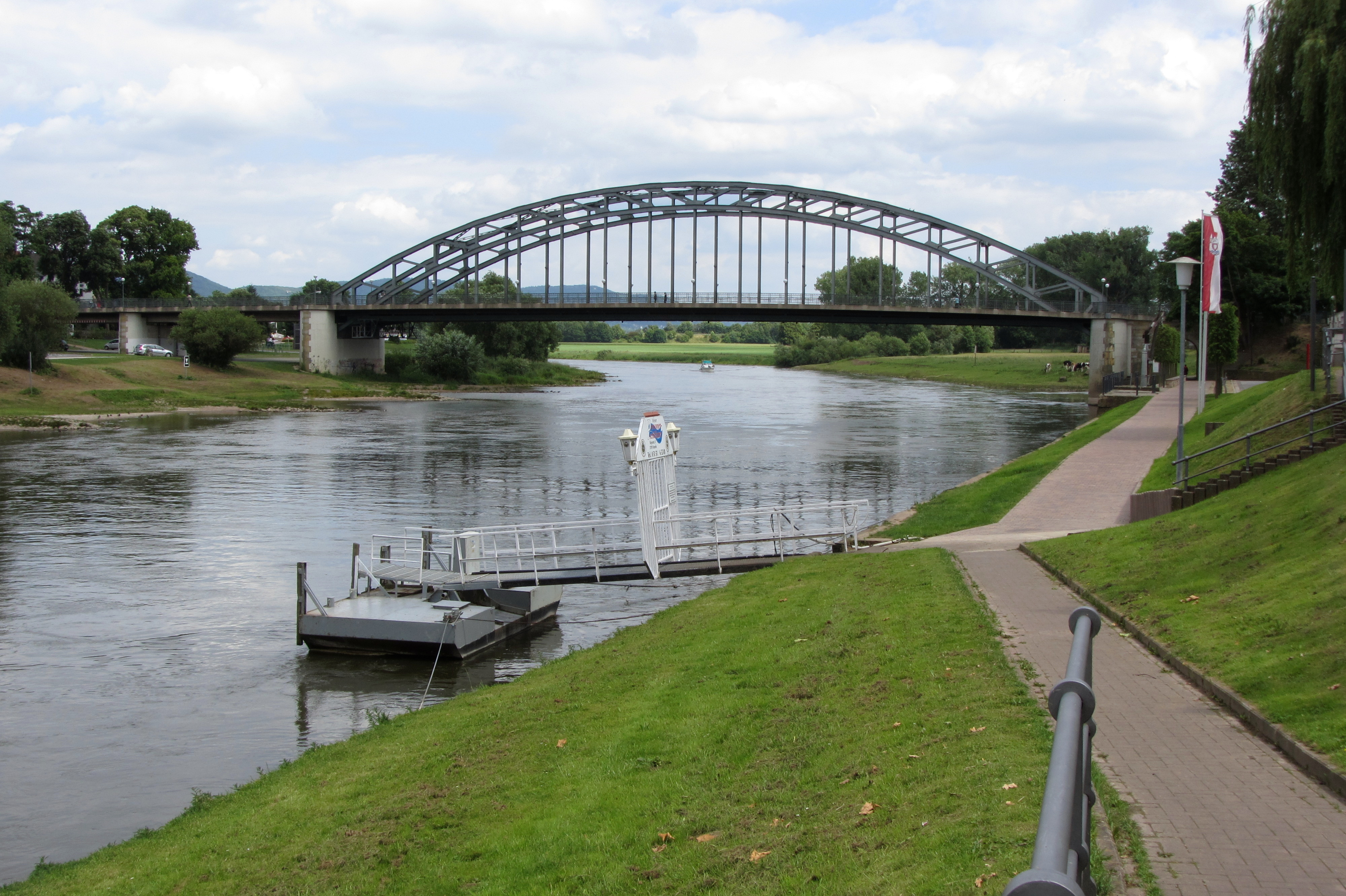 Rinteln. Blick auf Weser und Weserbrücke (Hindenburgbrücke). Im Vordergrund Schiffsanleger der Personenschifffahrt.